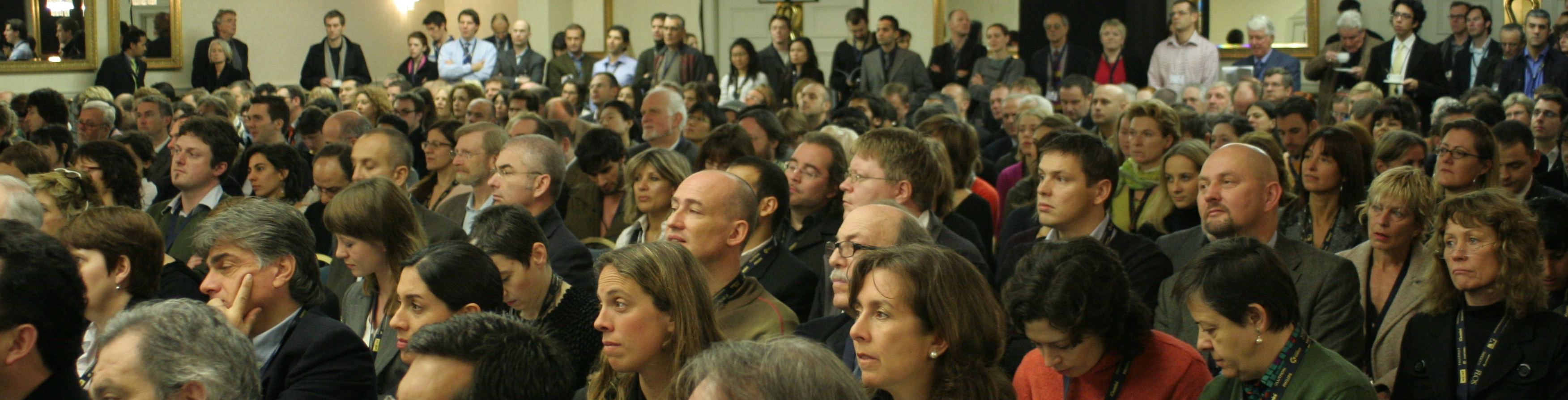 Foto bei einer Presentation